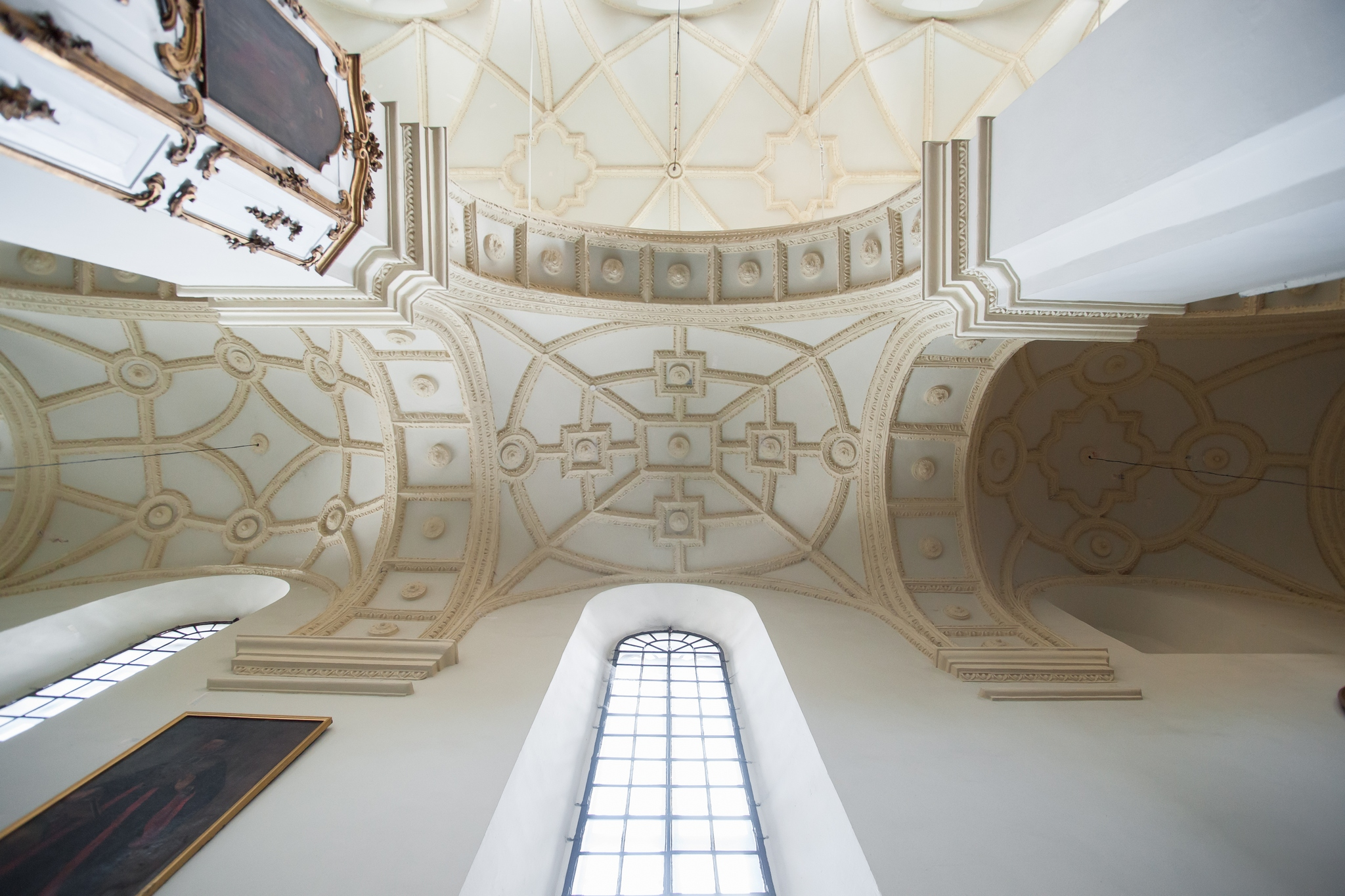 Lublin, zespół klasztoru bernardynów, XV, 1602-1607, XIX